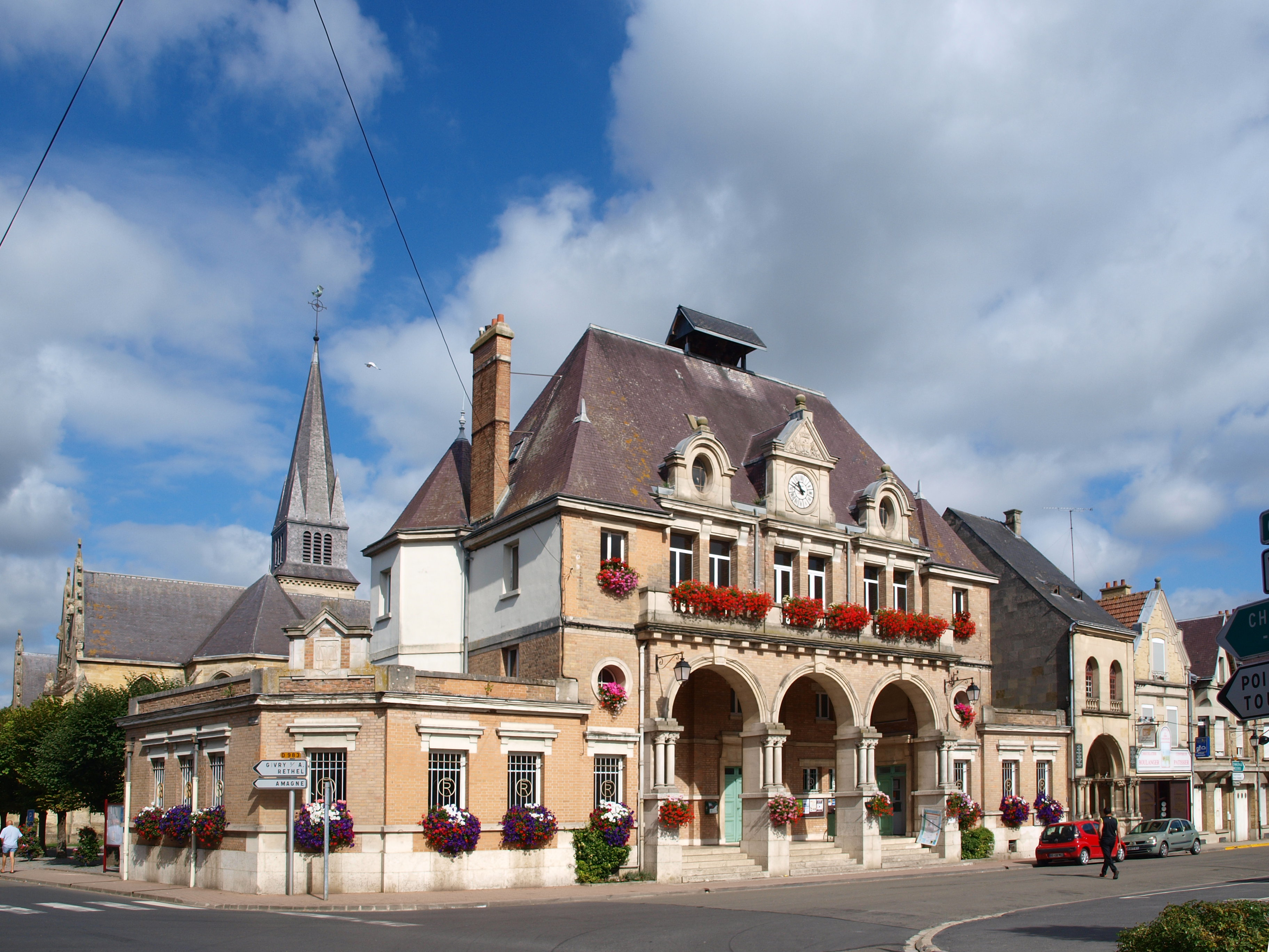 Attigny (Ardennes, France) ; mairie